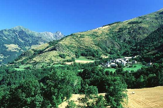 Oris en Rattier